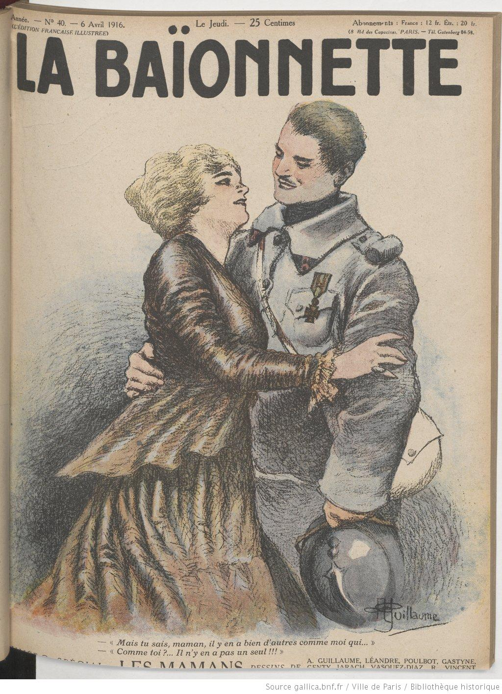 La couverture du journal satirique La Baïonnette du 6 avril 1916, illustrée par Albert Guillaume